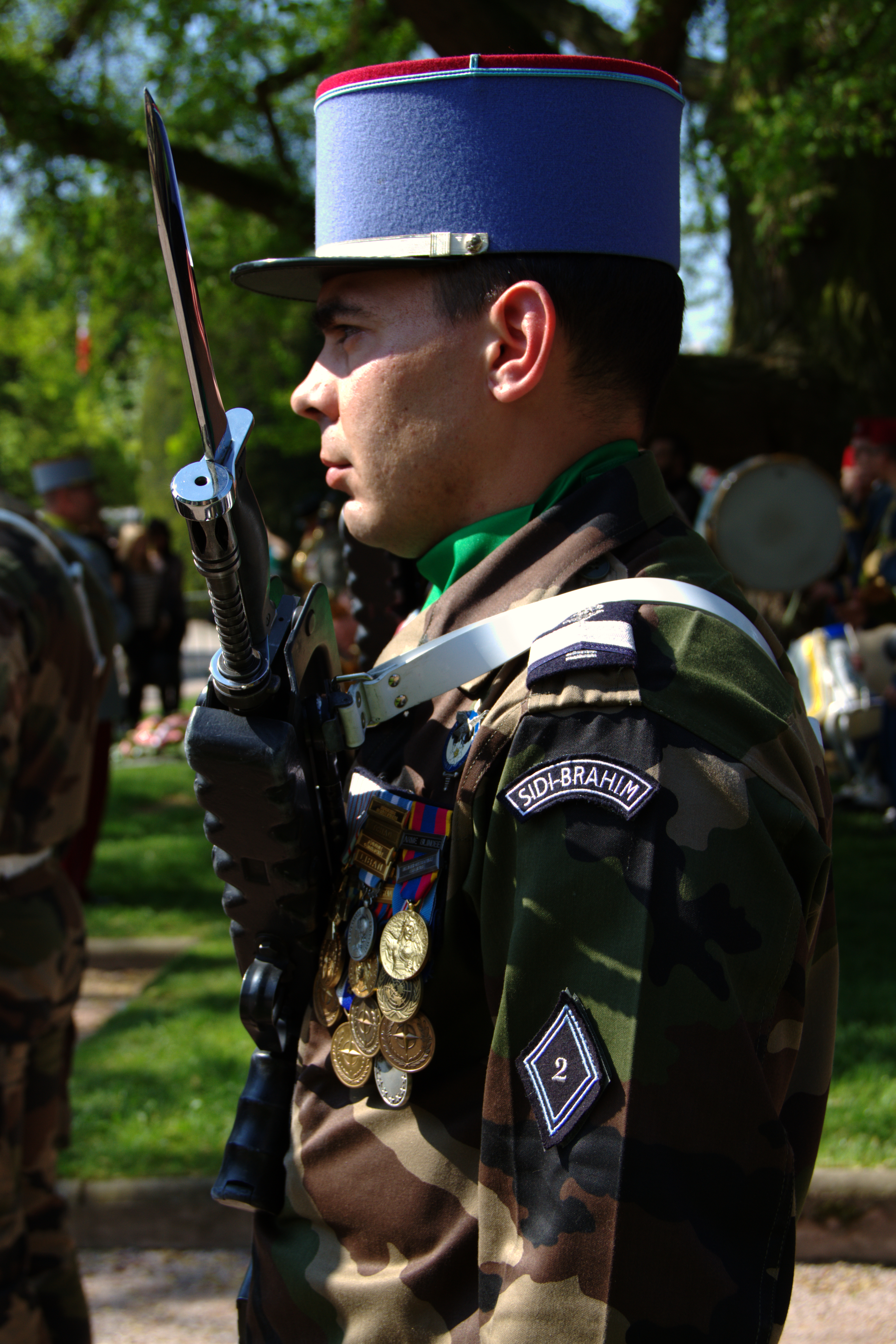 Cérémonie commémorative du 8-mai-1945 Strasbourg, place de la République 8 mai 2013